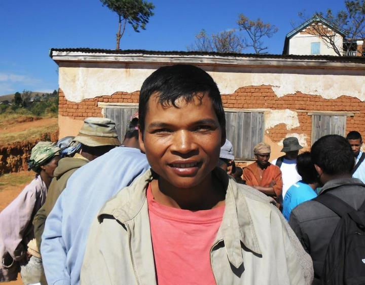 Homme Merina, peuple austronésien de Madagascar